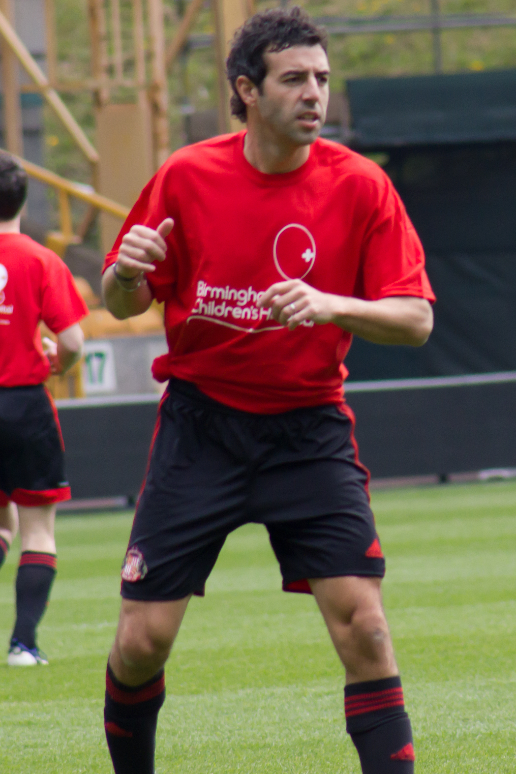 Hoooooooolio